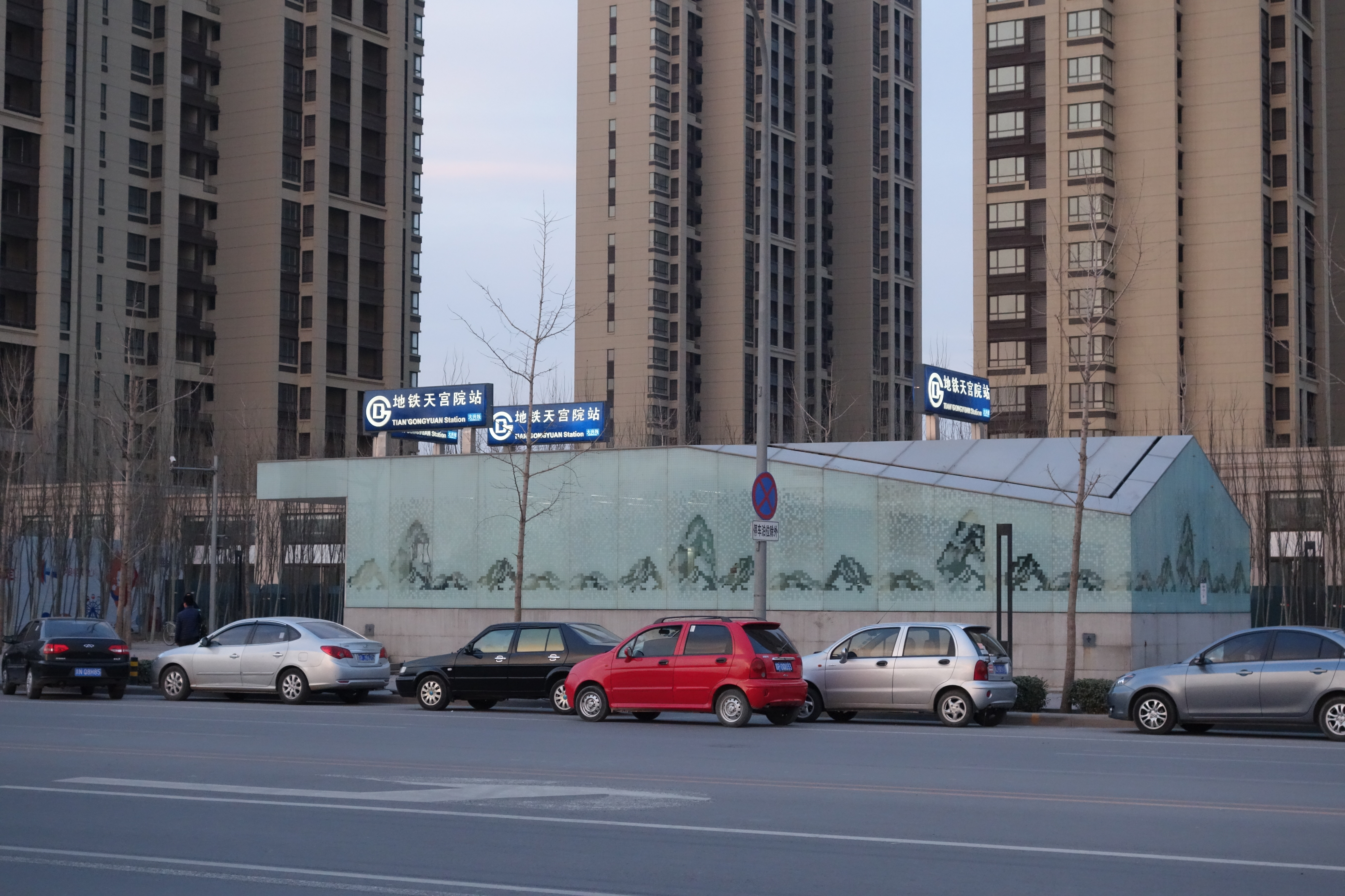 北京地铁天宫院站